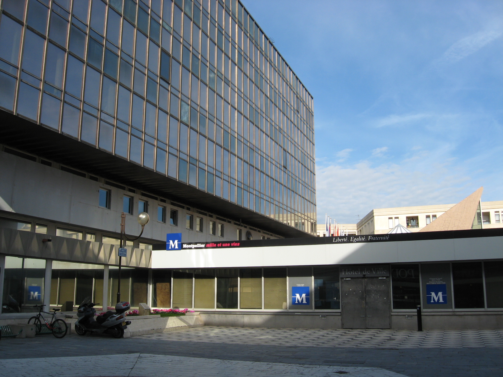 Hôtel de ville de Montpellier, place Francis-Ponge